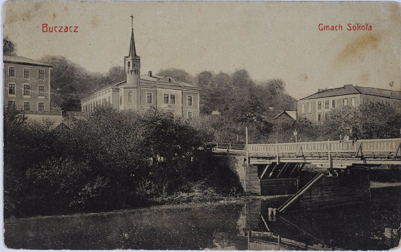 місток до будинку Сокола, Бучач (1900-1918 роки)